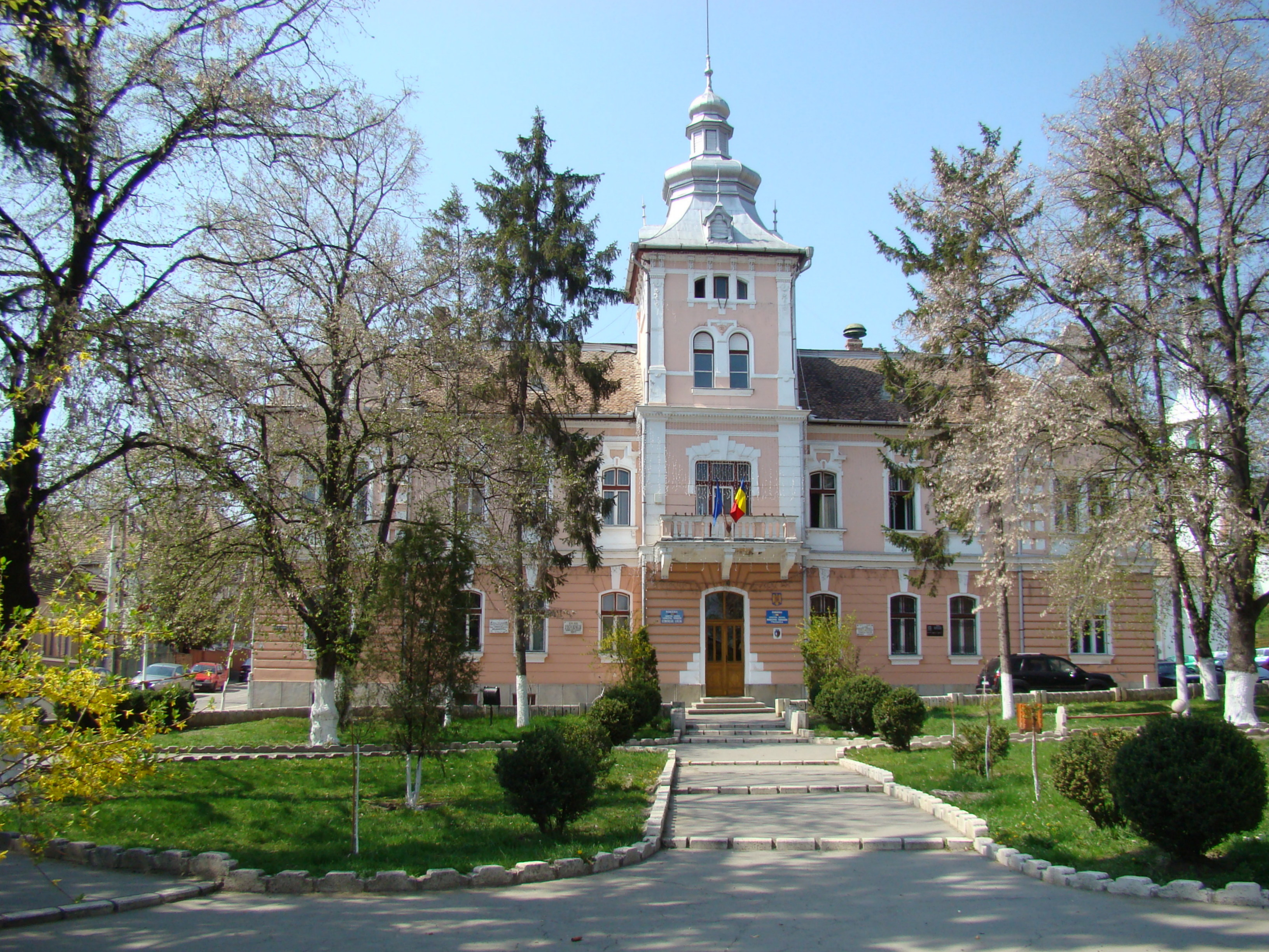 Primăria Târnăveni (fost palat al sfatului)